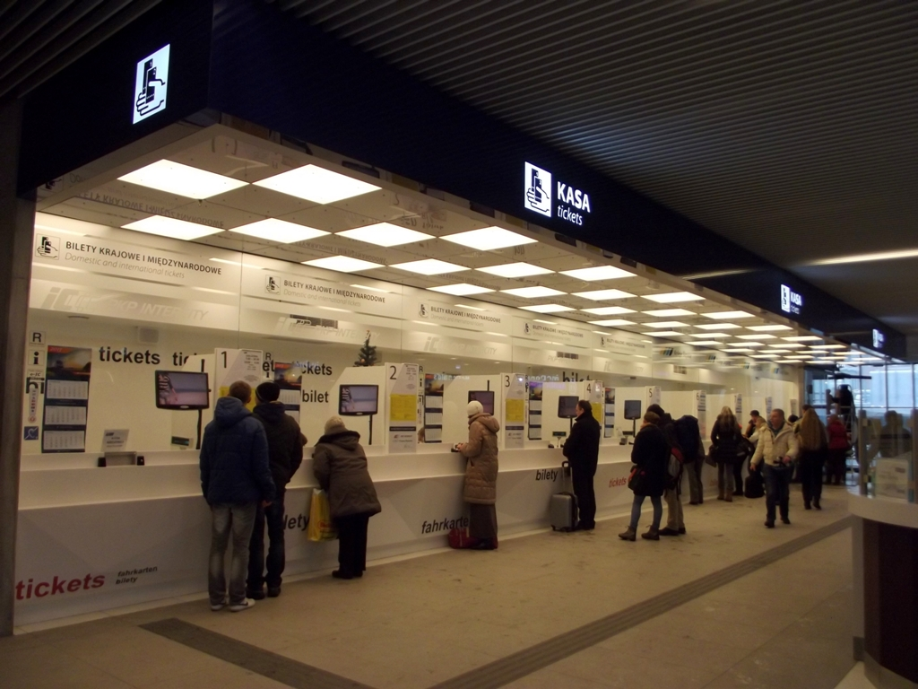 Zdjęcie zrobione podczas Intel Extreme Masters 2013 w katowickim Spodku.